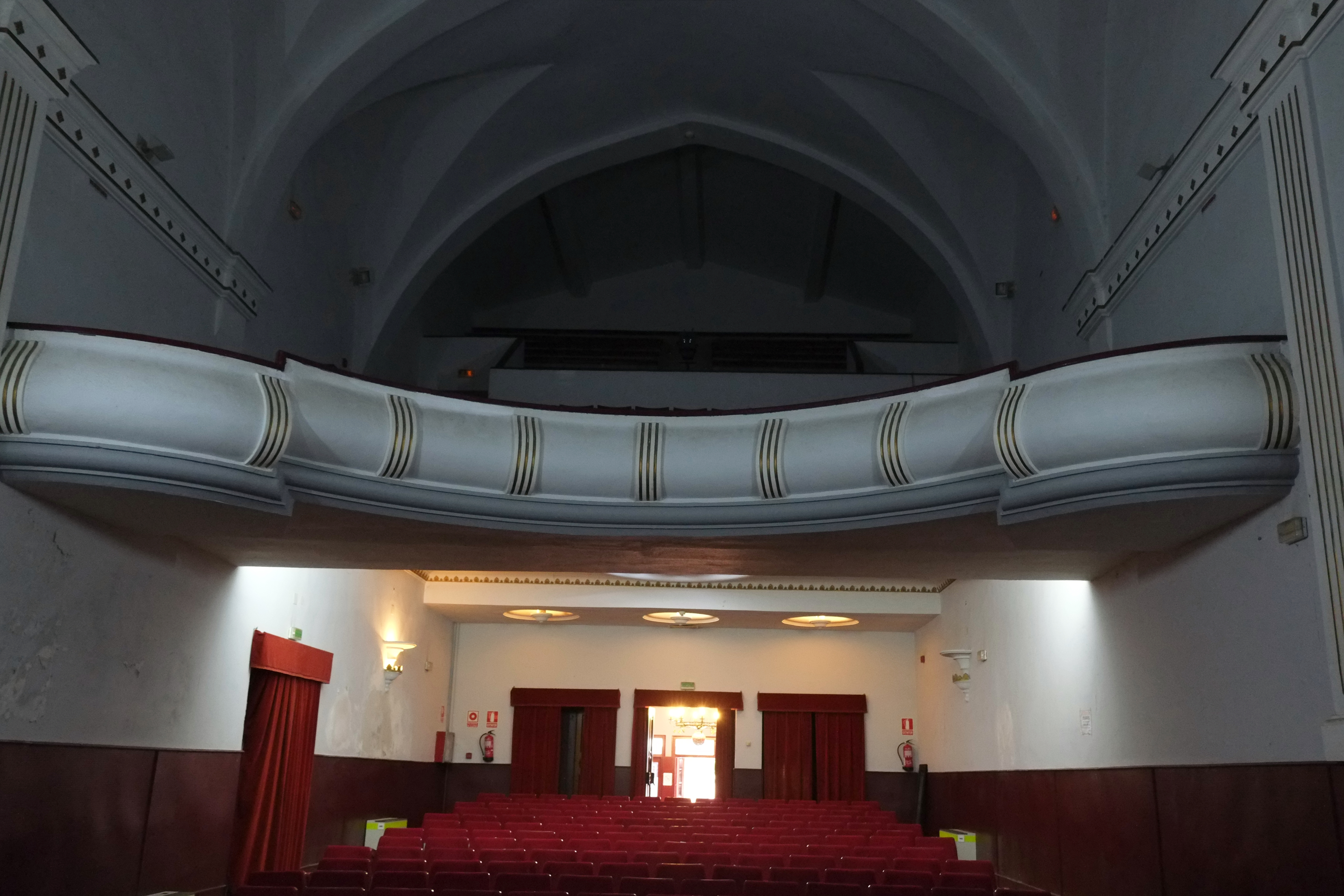 Cinema Calatrava in Fitero in Navarra (Spanien)